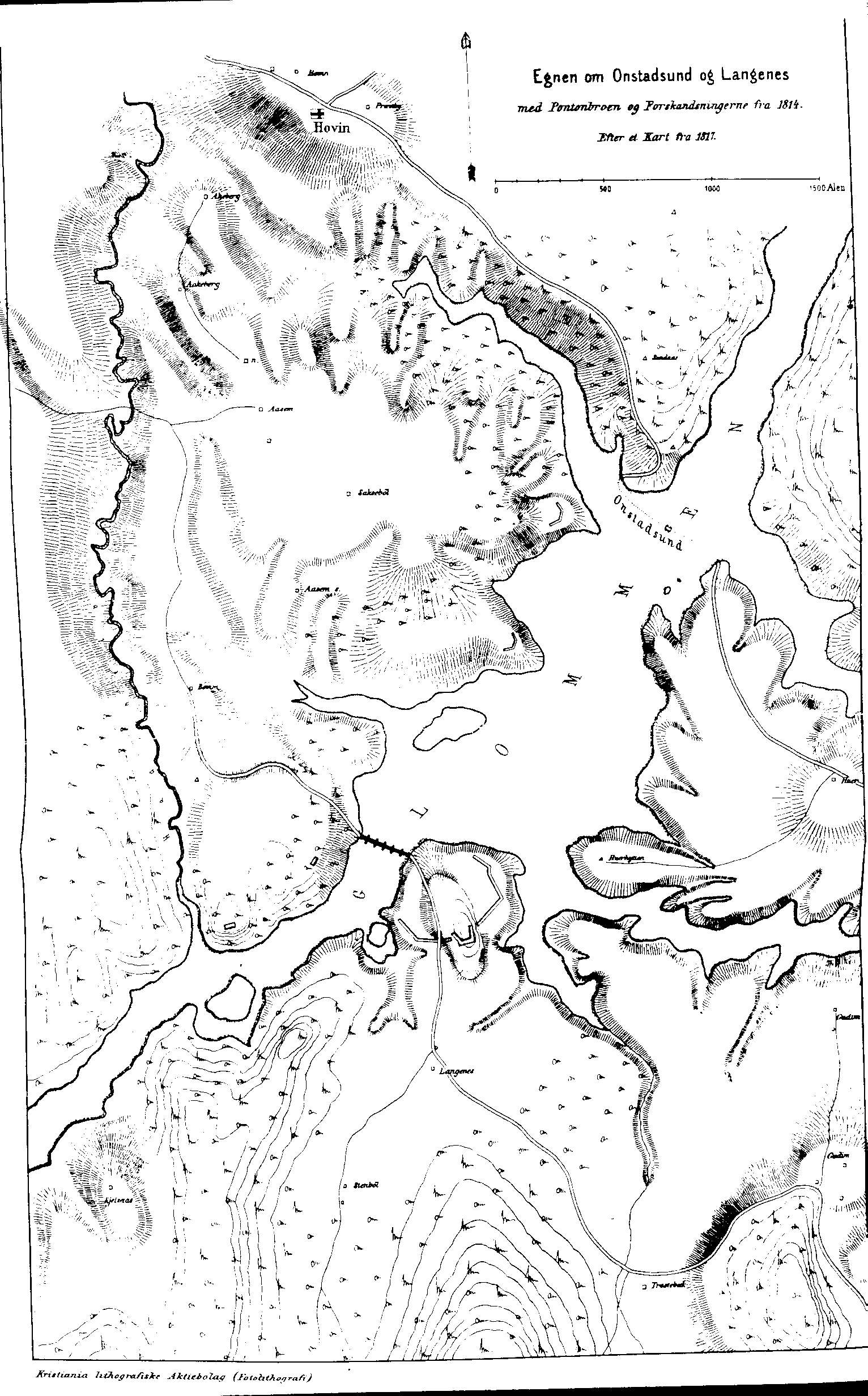 Karte von Langnes, in der die Ponton-Brücke und die Schanze eingetragen sind. Die Schweden kamen von Süden.